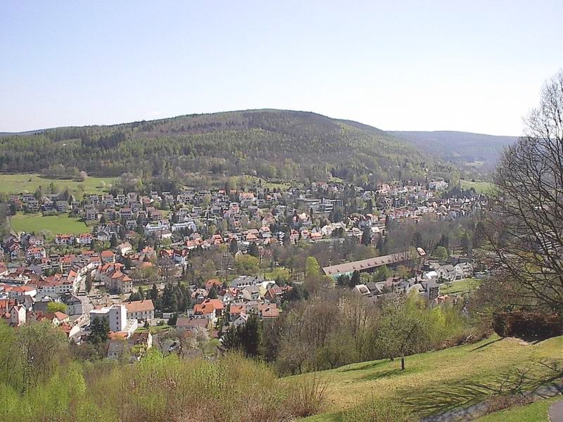 Bad Orb, Blick vom Wartturm auf dem Molkenberg ins Orbtal